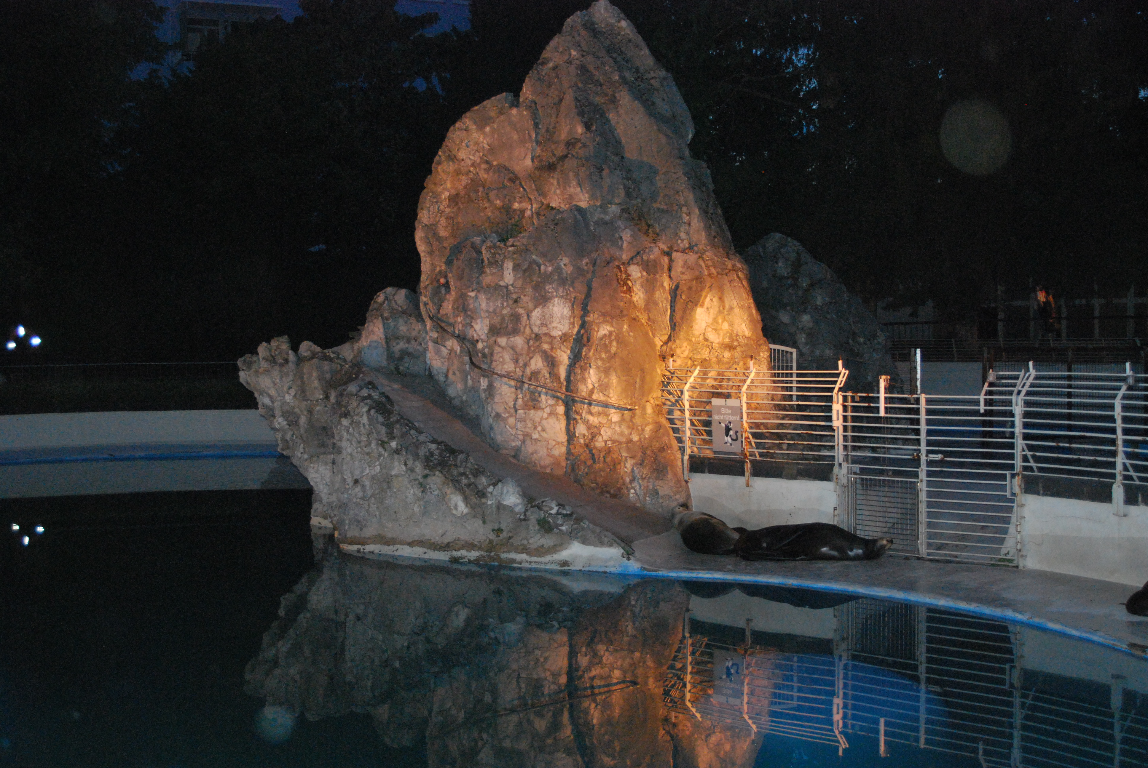 Seelöwenfels im Kölner Zoo